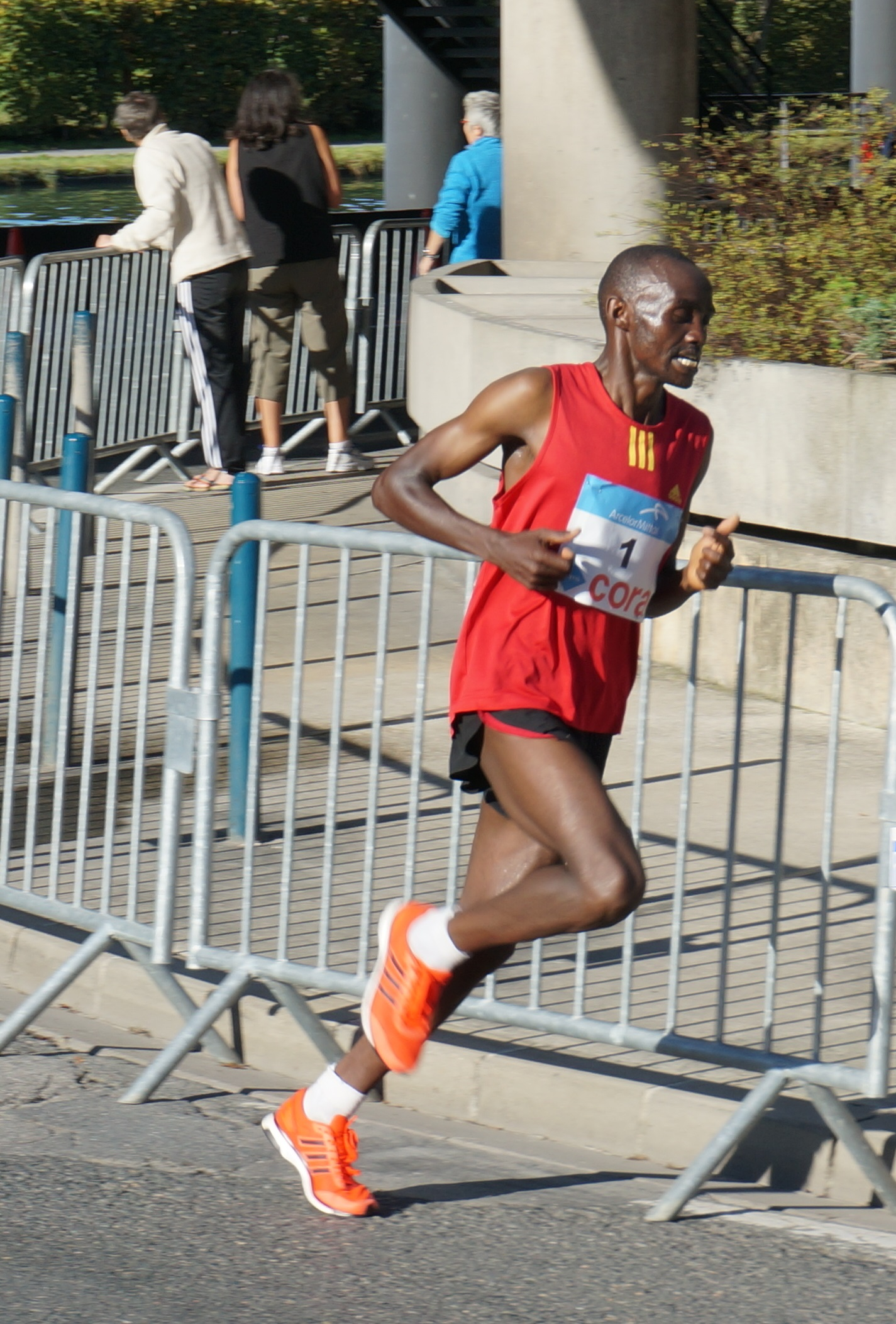 lors du Marathon de Reims 2014.